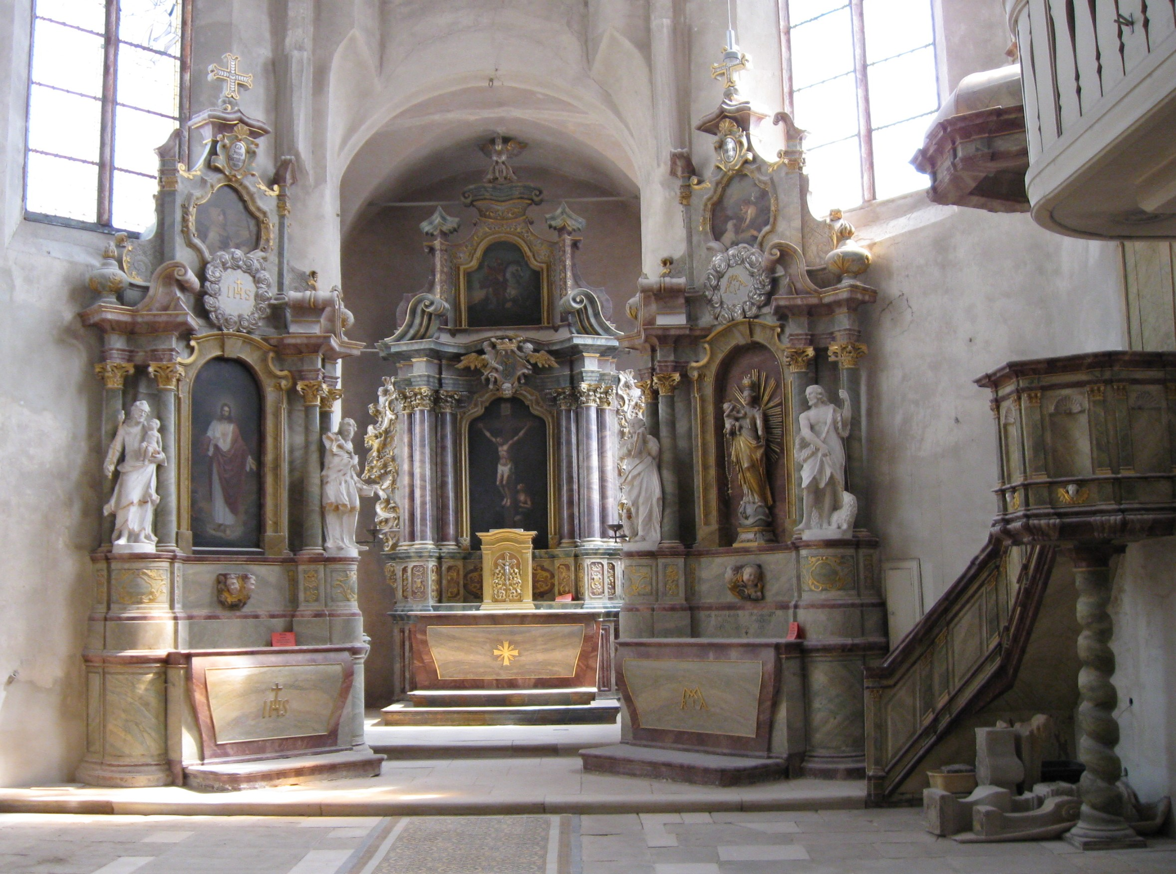 Hochaltar im spätgotischen Chorraum der Georgskirche in Wachenheim